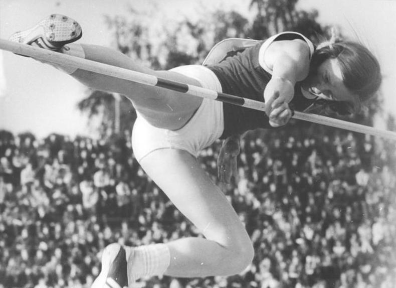 Rosemarie Witschas ADN-ZB Spremberg 23.6.74 Bukarest: Leichtathletik-Länderkampf Rumänien - Kanada - DDR. Herausragendes Ergebnis des Länderkampfes war am 23.6.74 ein Hochsprung von 1,93 m der 22jährigen Cottbuserin Rosemarie Witschas, mit dem sie ihren DDR-Rekord vom 1.6.74 (1,91) um zwei Zentimeter verbesserte. Der Weltrekord der Bulgarin Jordanka Blagoewa steht bei 1,94 m. (Unser Foto entstand bei einem früheren Wettkampf vor kurzem)